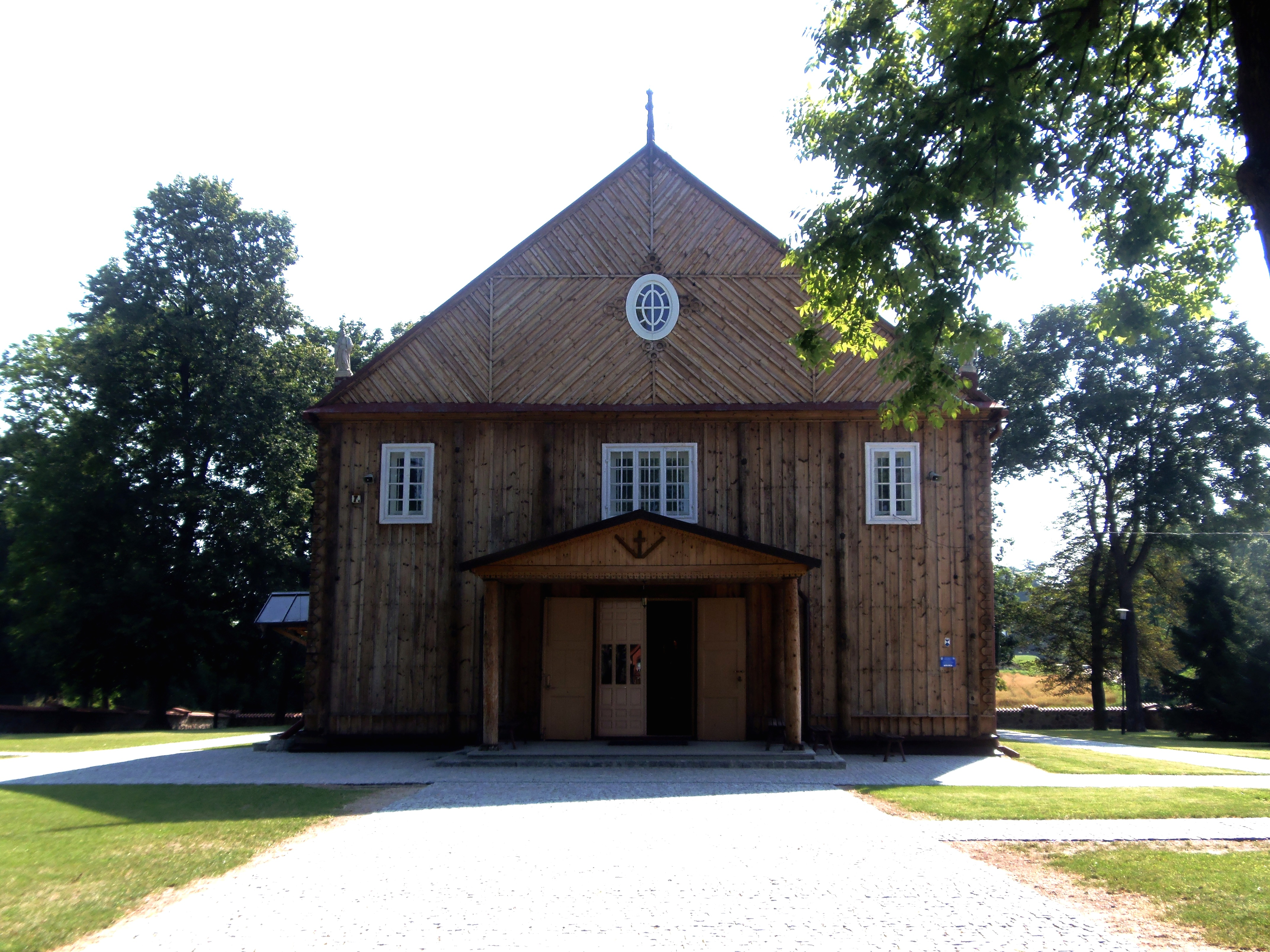 Ostrożany, kościół parafialny pw. Narodzenia NMP z lat 1756-1758